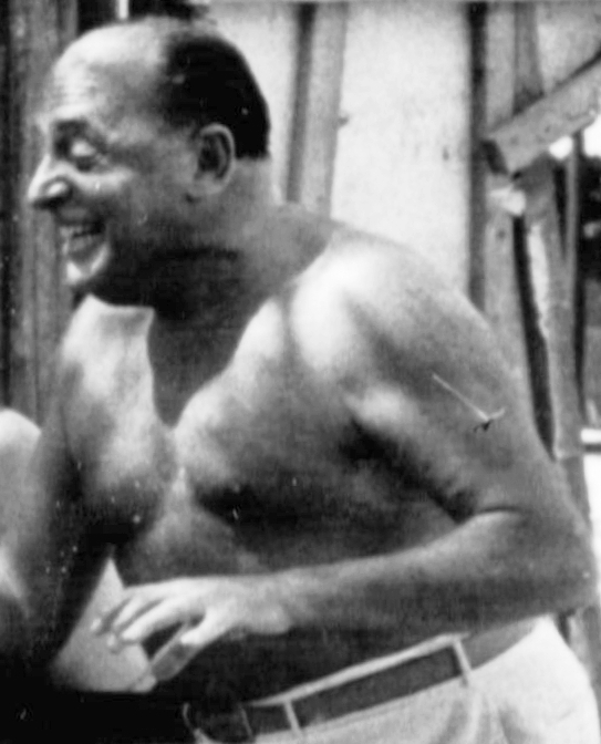 Dénes Oszkár magyar színész.